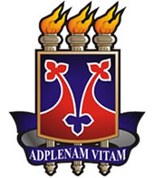 Brasão oficial da Universidade Estadual do Sudoeste da Bahia